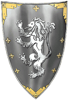 Écu (bouclier)